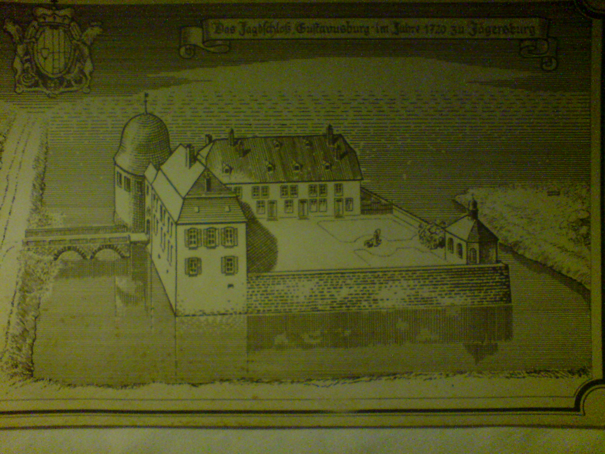 Die Gustavsburg in Jägersburg bei Homburg (Saar)